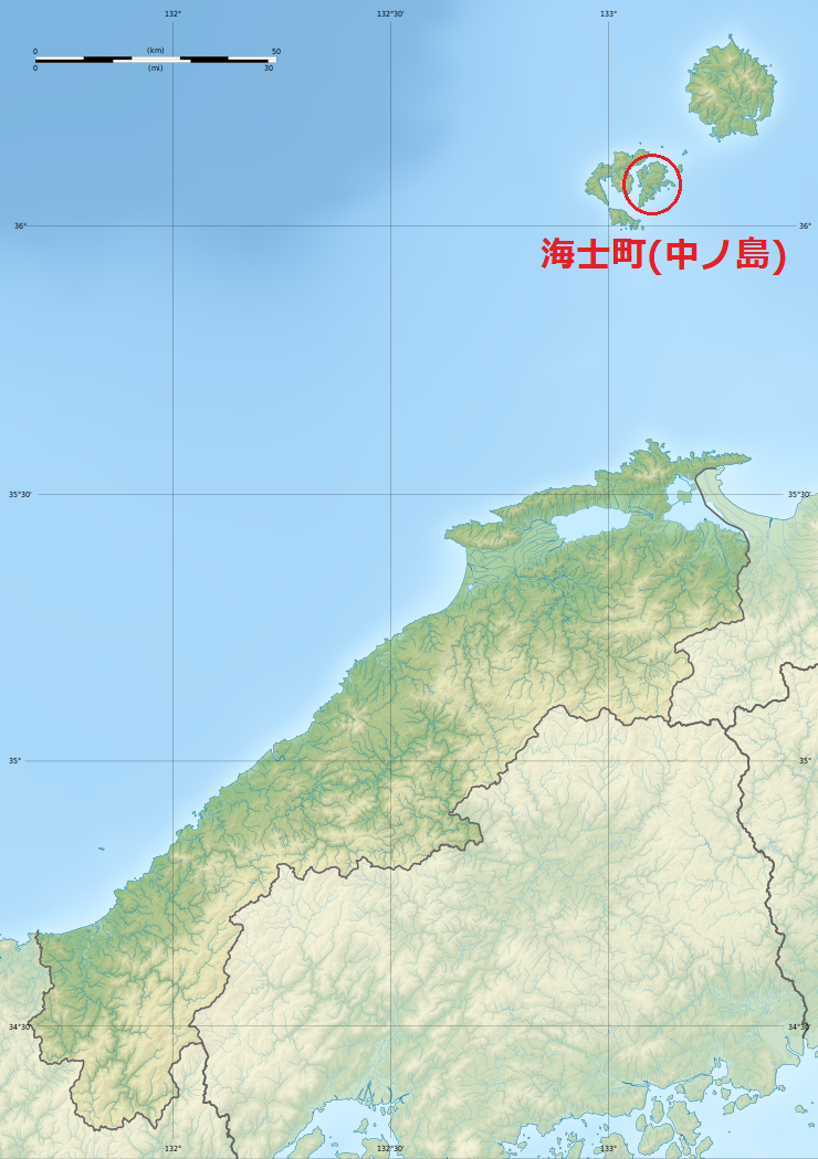 島根県における海士町（中ノ島）の位置。